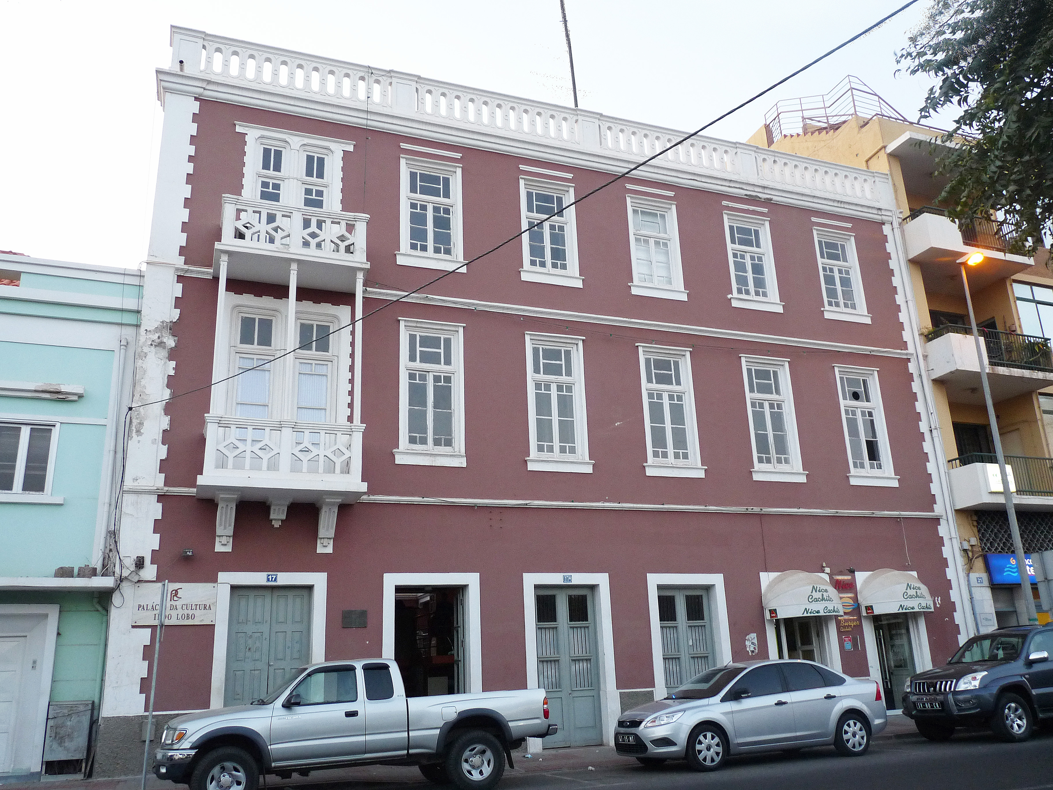 Praia (Cap-Vert) : Palácio da Cultura Ildo Lobo